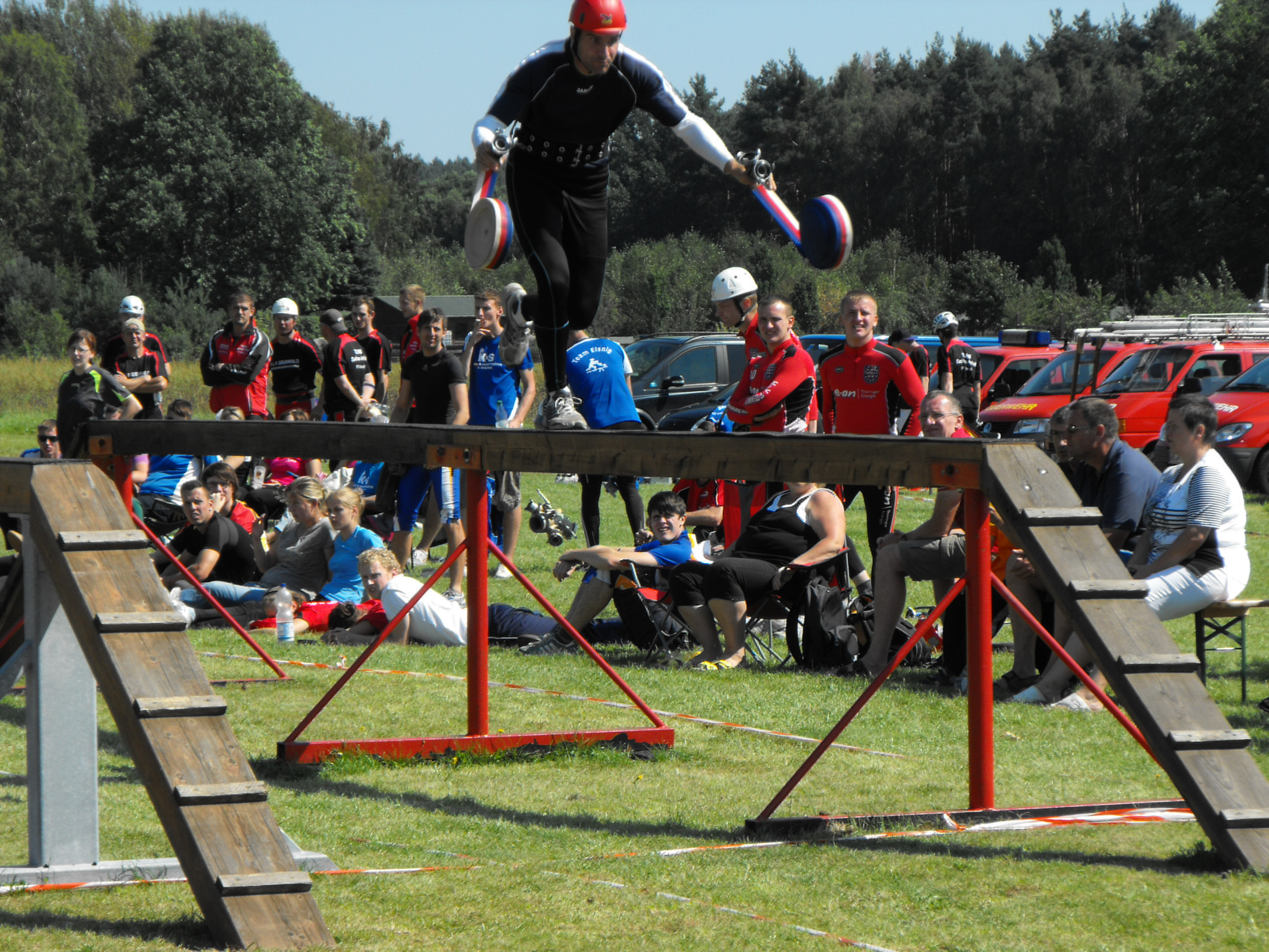 Klaus Köster beim Überwinden des Laufbalkens